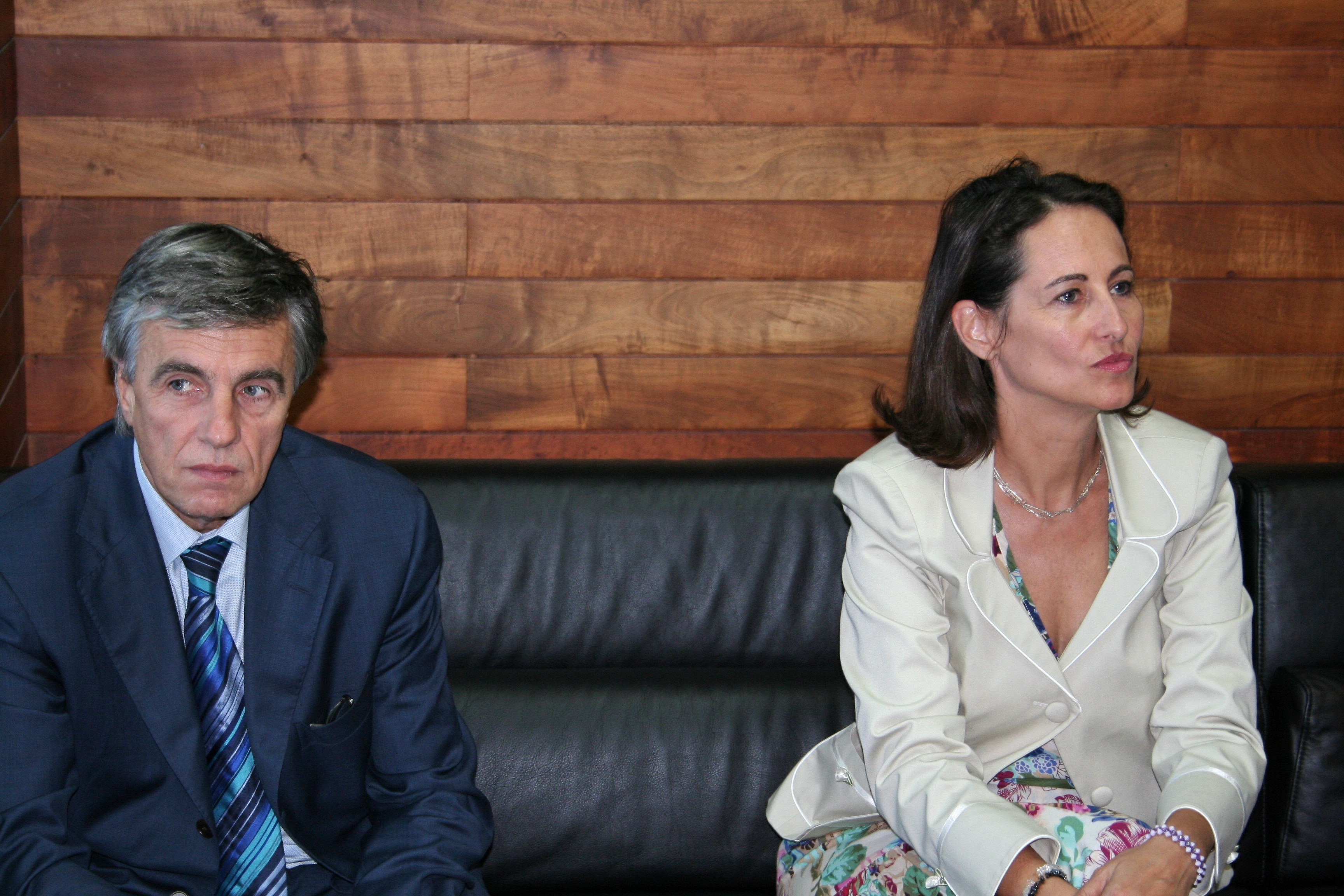 François Marc aux côtés de Ségolène Royal lors d'un déplacement à La Réunion.